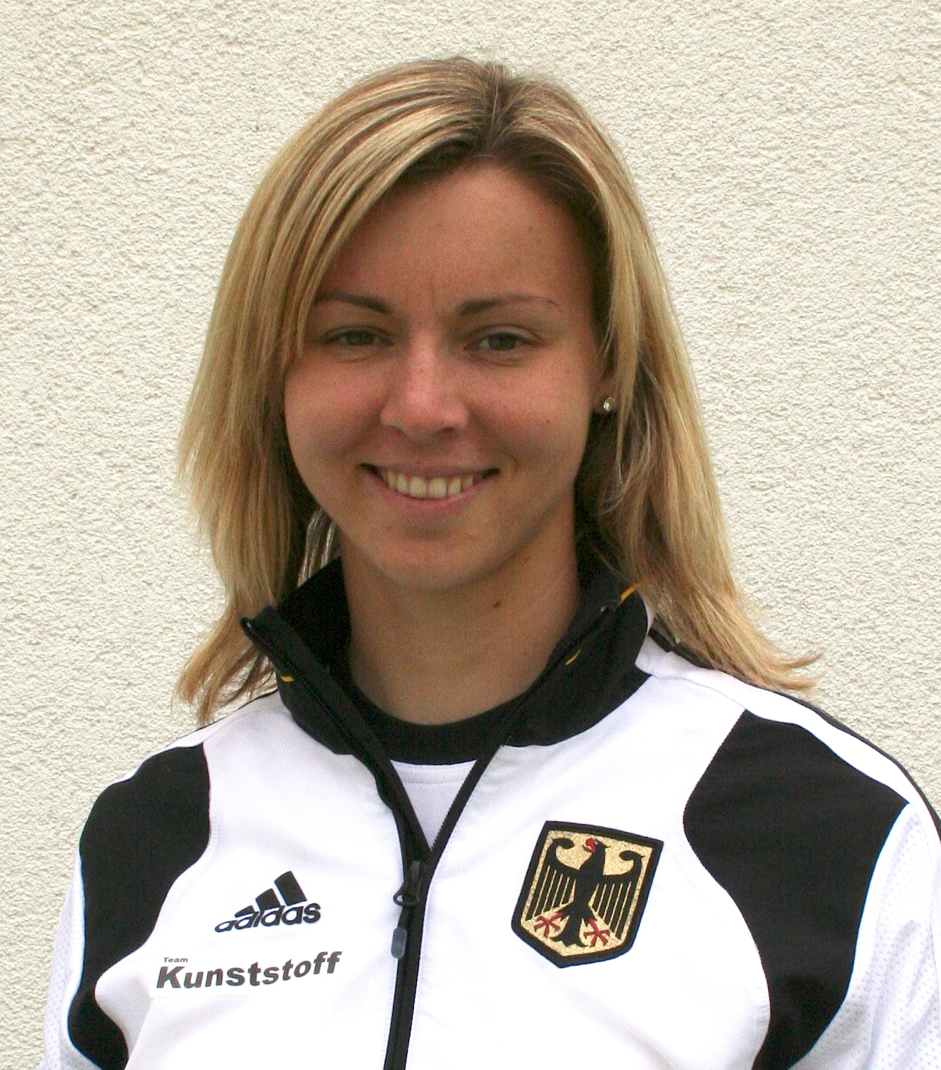 Deutsche Kanu-Rennsportlerin und Olympiasiegerin im Vierer-Kajak über 500m im Jahr 2008 in Peking.